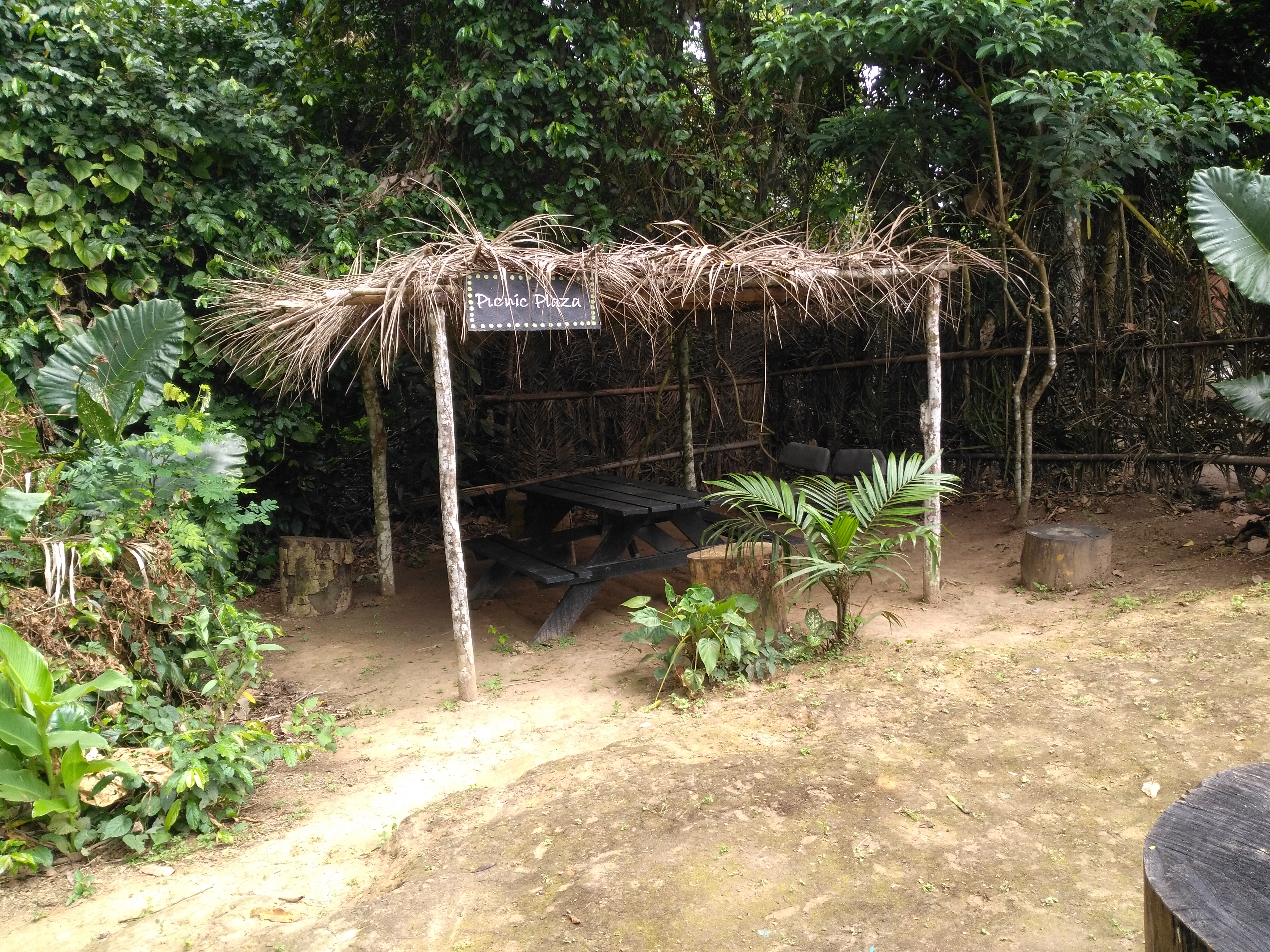 Parc des Primates de la Mefou, Mefou, Région du Centre, Cameroun.